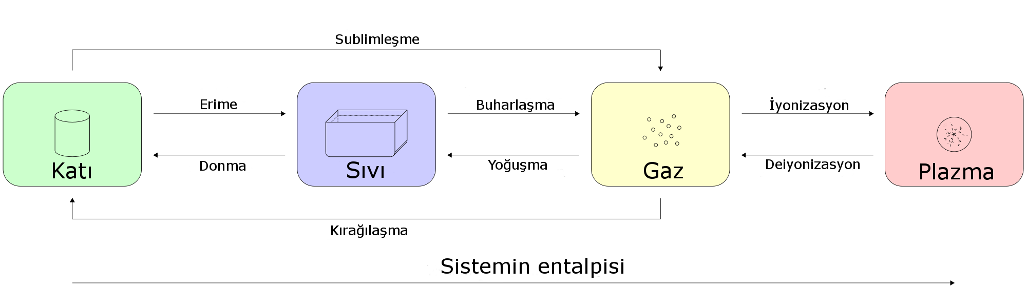 Maddenin halleri ve hal değişimi